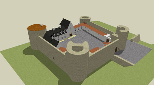 image de synthèse de l'ensemble castral de Nomeny au 16°s.